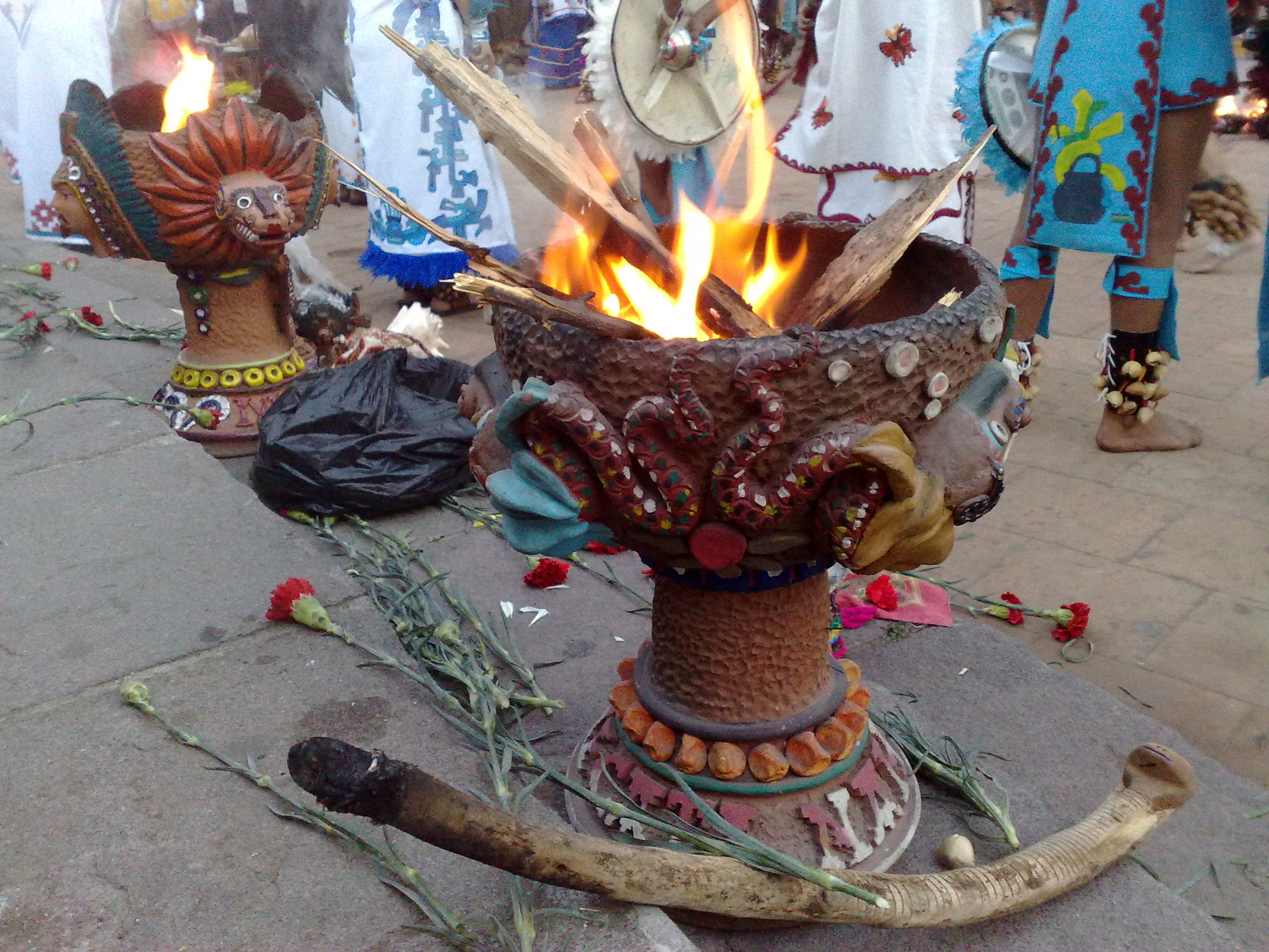 Ceremonia Azteca del Fuego Nuevo en Metepec